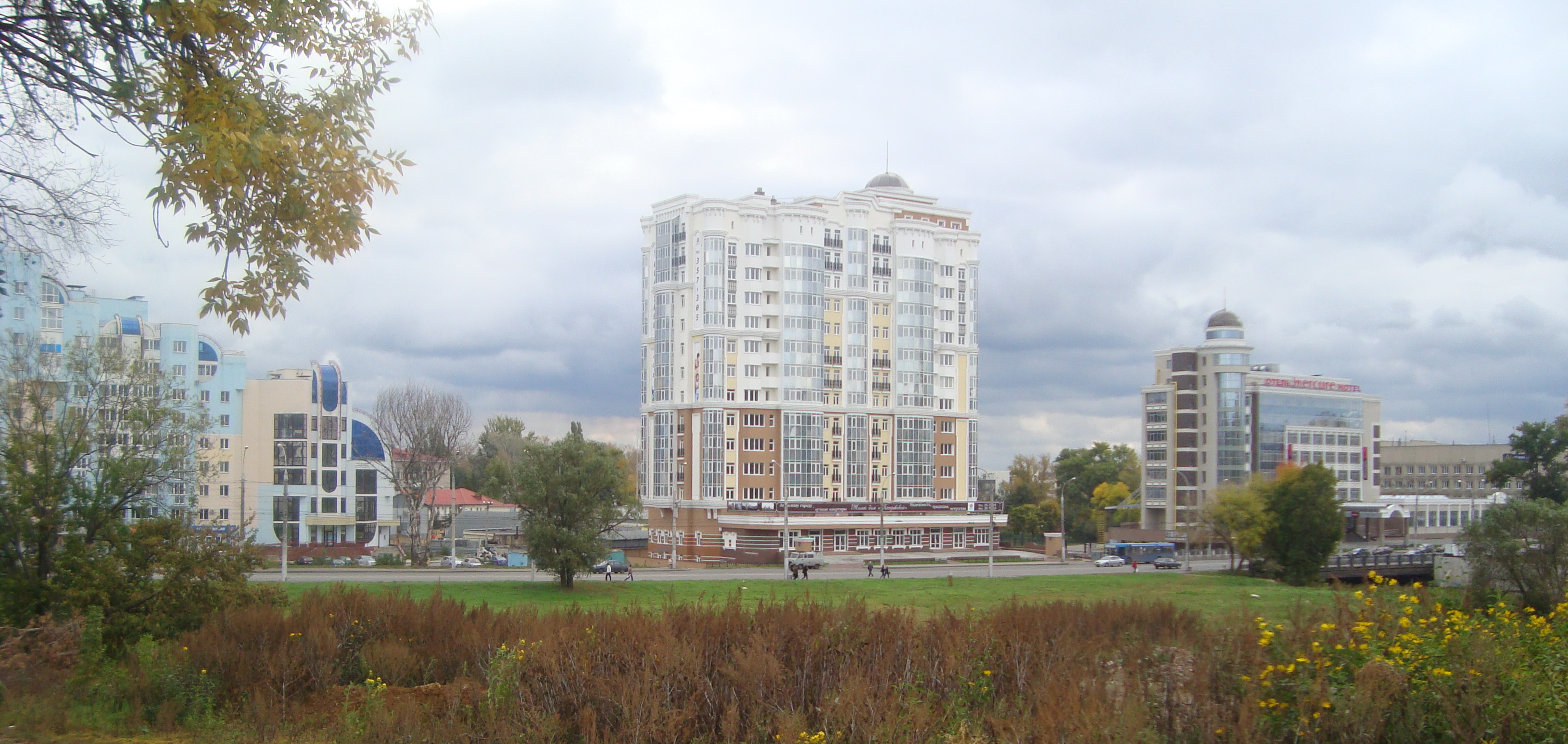 Улица Плеханова (Липецк)